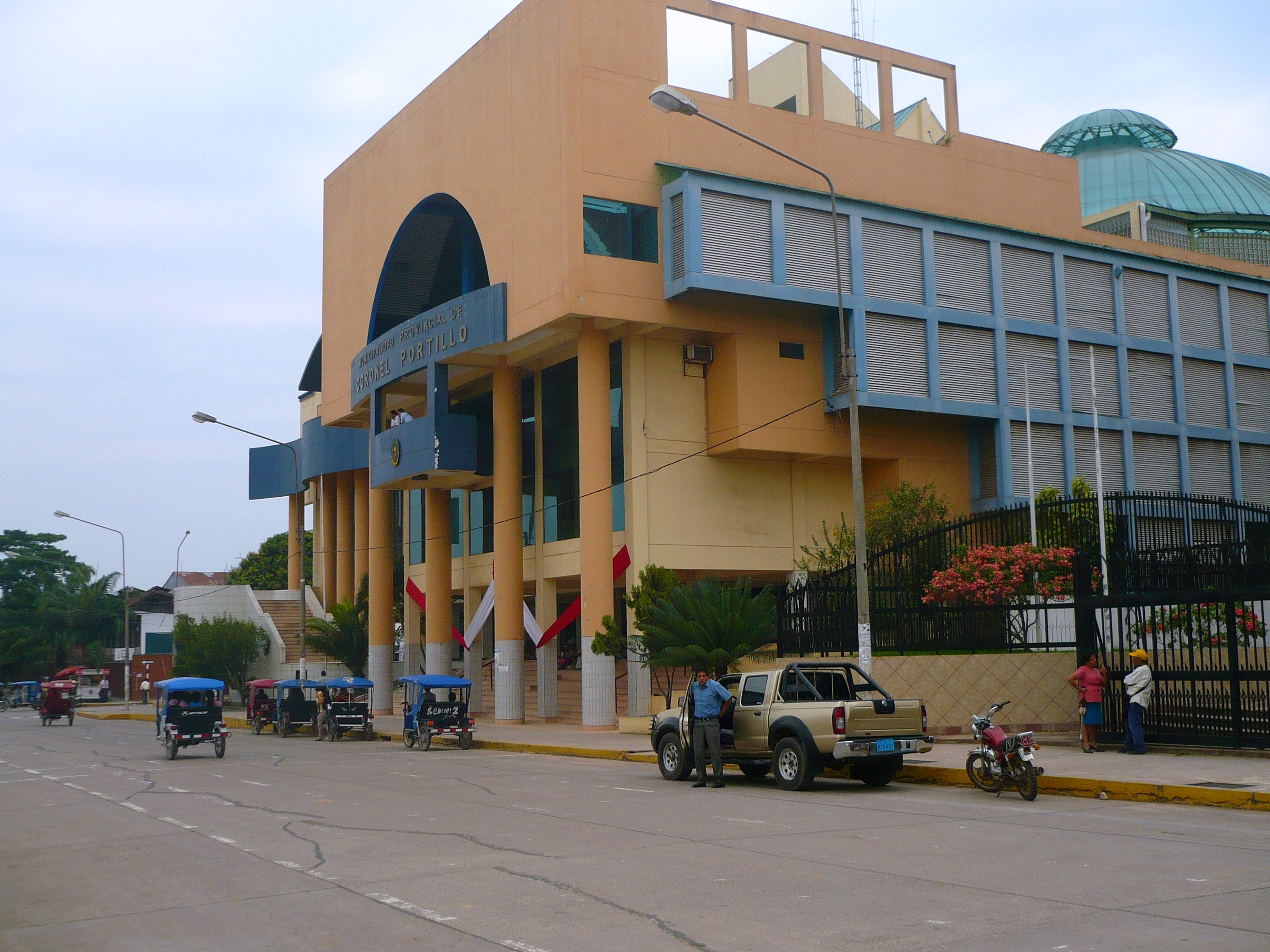 La Municipalidad provincial de Coronel Portillo visto desde el exterior la sede.